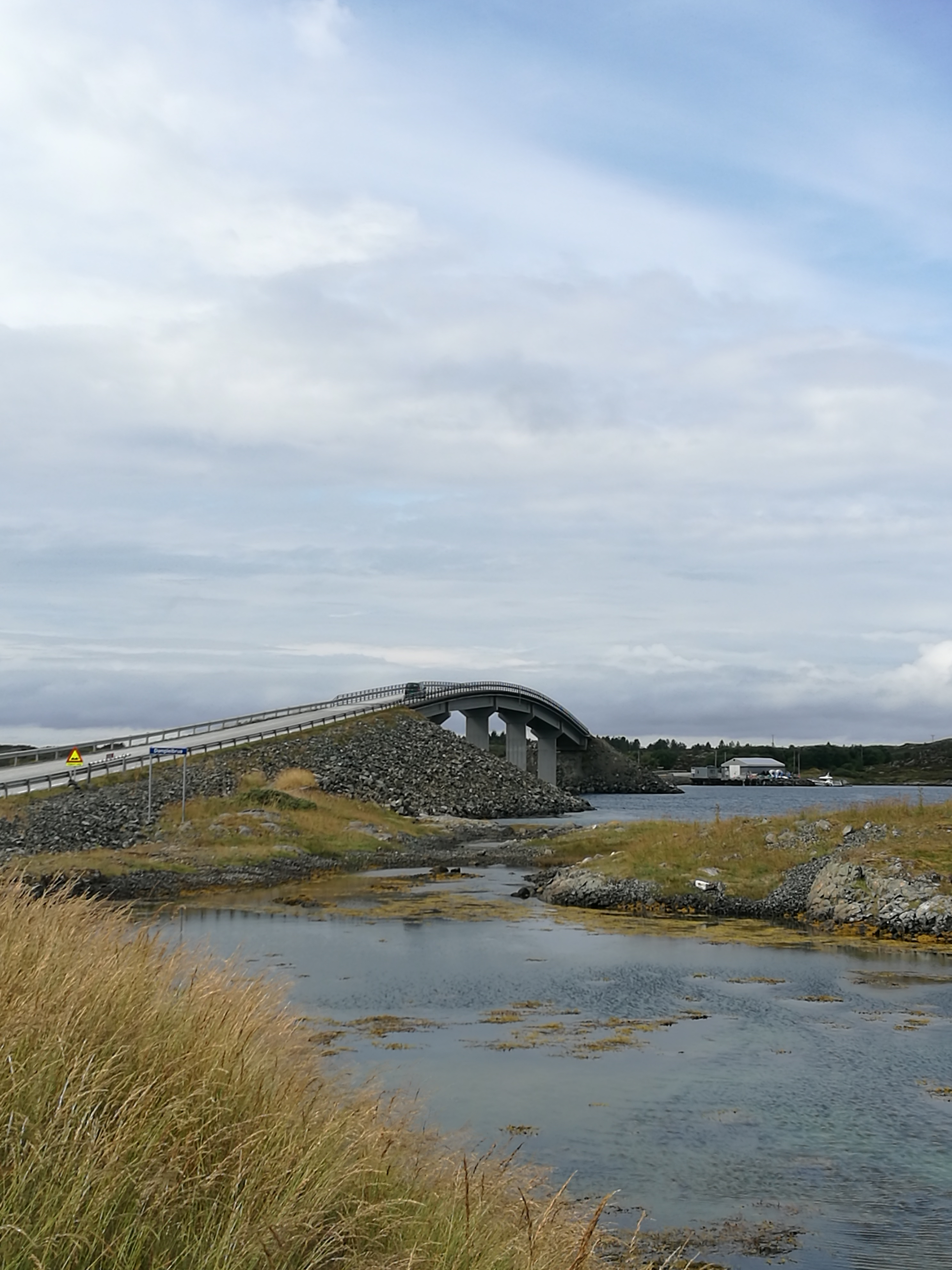 Dampleibrua (161 meter) på Smøla mellom Lamøya og Rossvolløya, Fylkesvei 669.